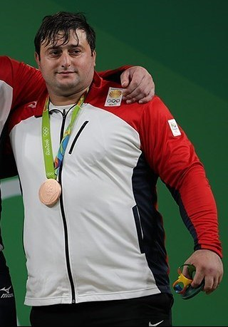 Бронзовый призёр Летних Олимпийских игр в Рио-де-Жанейро в соревнованиях по тяжелой атлетике грузинский штангист Ираклий Турманидзе.